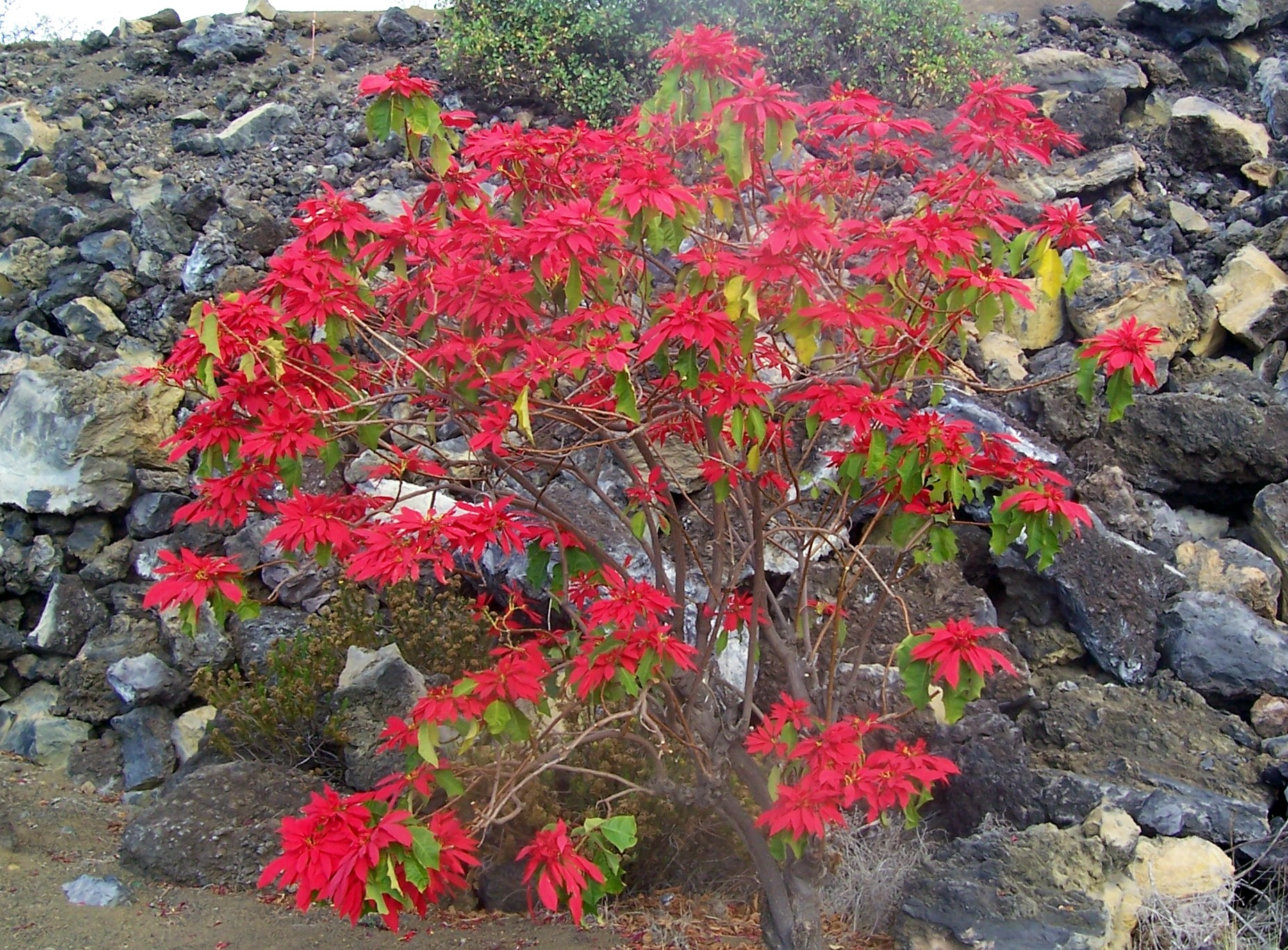 Weihnachtsstern (Euphorbia pulcherrima) auf Teneriffa